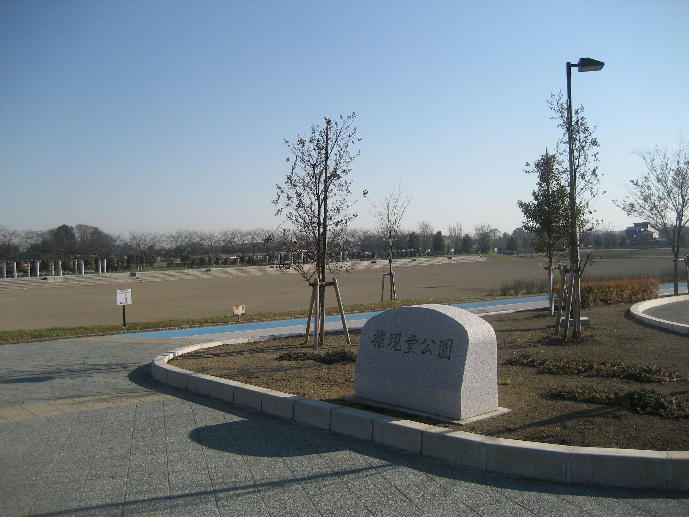 埼玉県営権現堂公園（栗橋町）